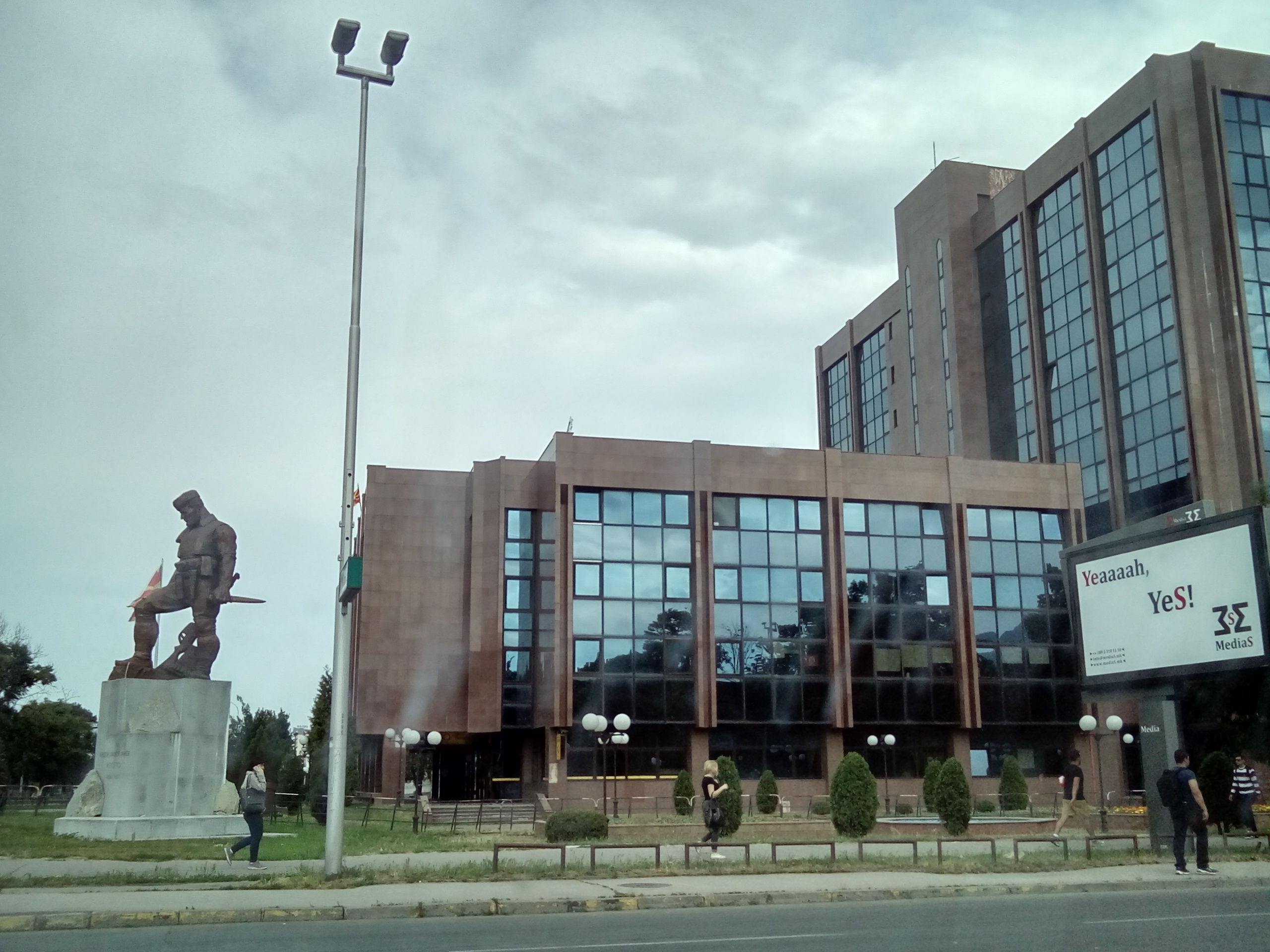 Centar, Skopje 1000, Macedonia (FYROM)